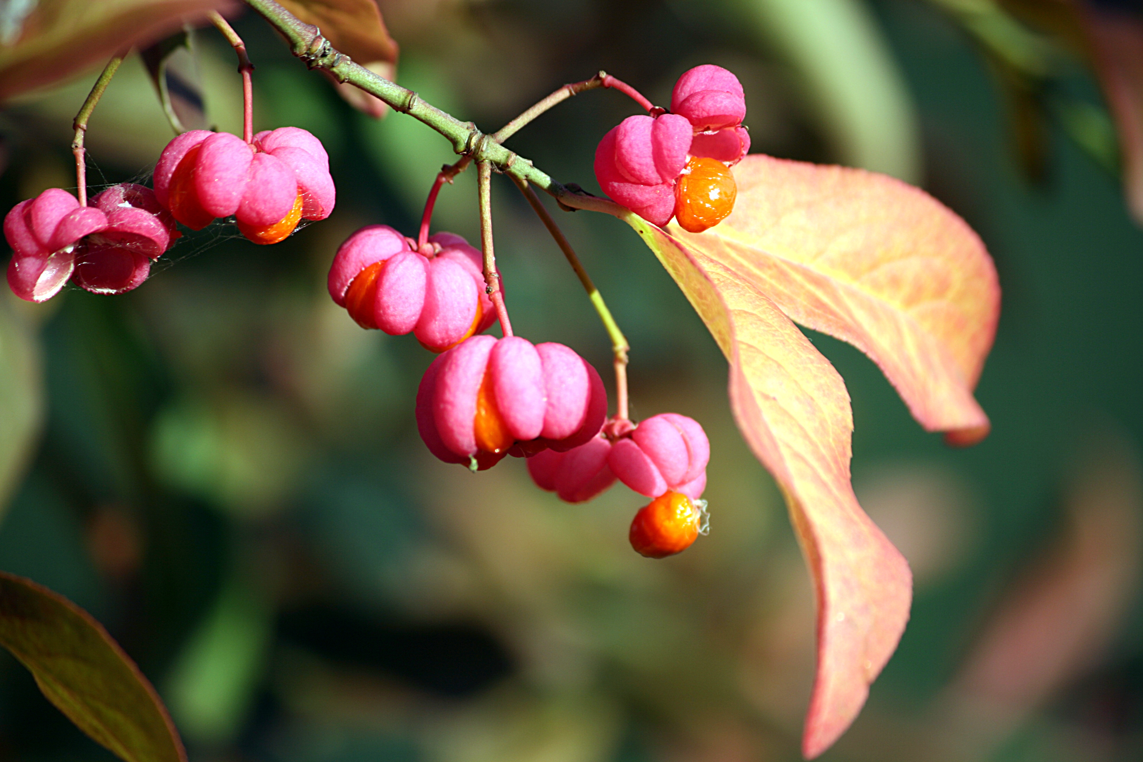 Gewöhnlicher_Spindelstrauch_(Euonymus_europaeus)